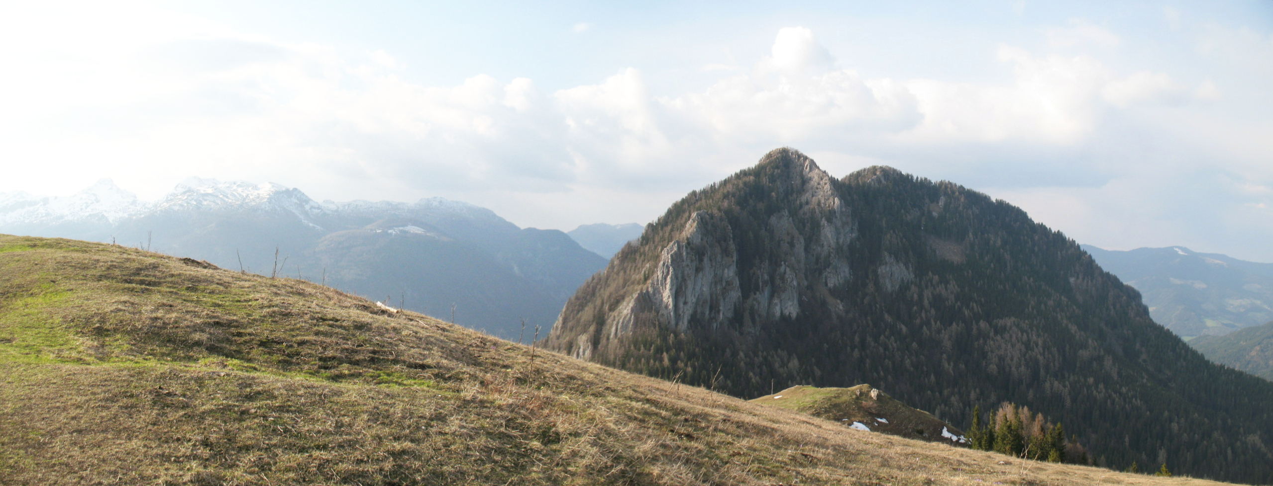 Slika je bila narejena na vrhu planine Lepenatke.